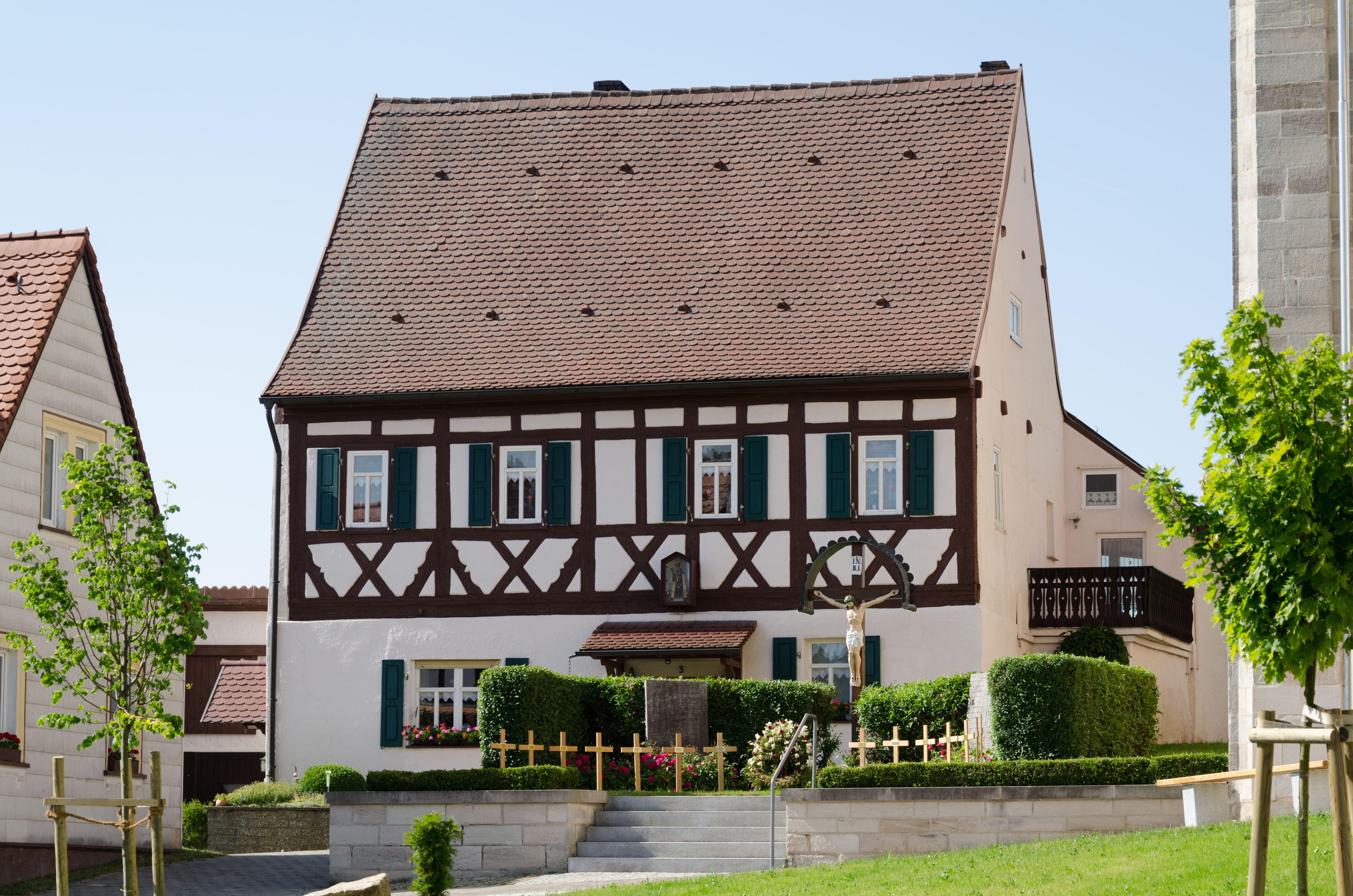 Rauhenebrach, Prölsdorf, Am Landgericht 3